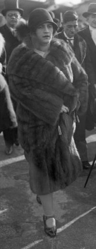 Der Königs Aman Ullah von Afghanistan besichtigt den Centralflughafen in Berlin-Tempelhof! Der König und die Königin bei der Besichtigung des Flughafens.